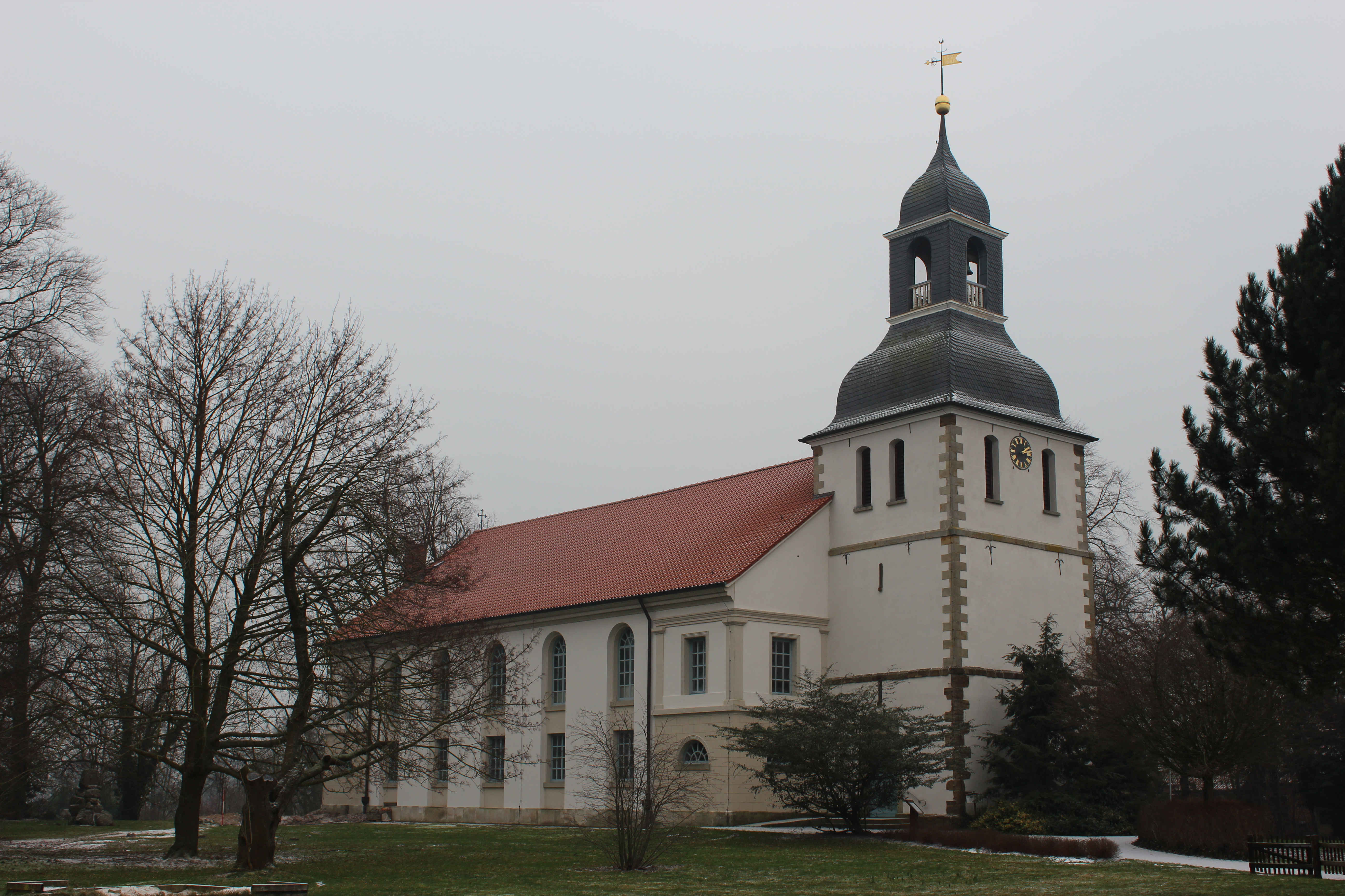 Kirche der Ev.-luth. Gemeinde Blender (Landkreis Verden)